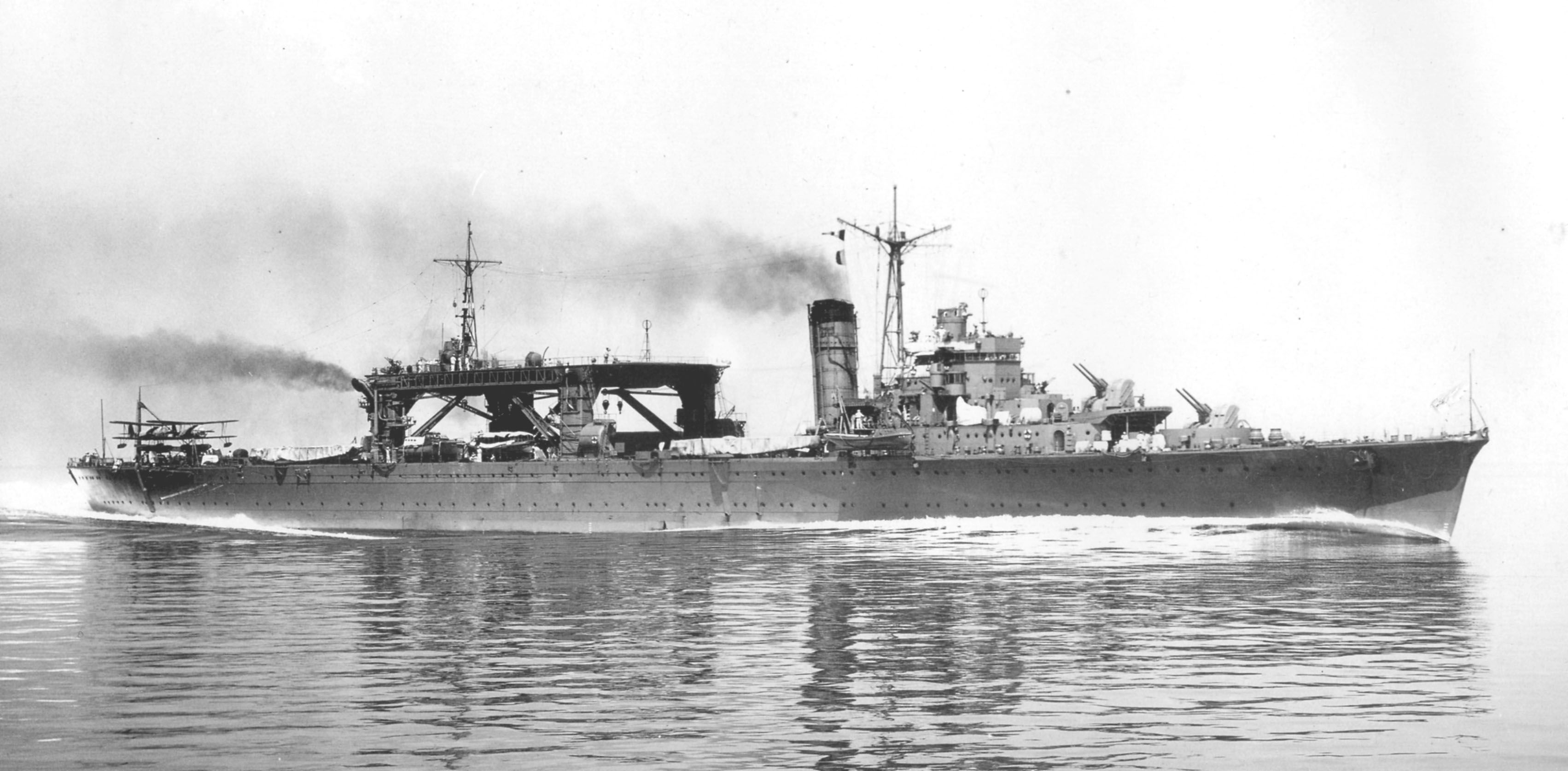 日本海軍水上機母艦千歳型「千歳」鹿児島県佐多岬沖にて公試中の写真。